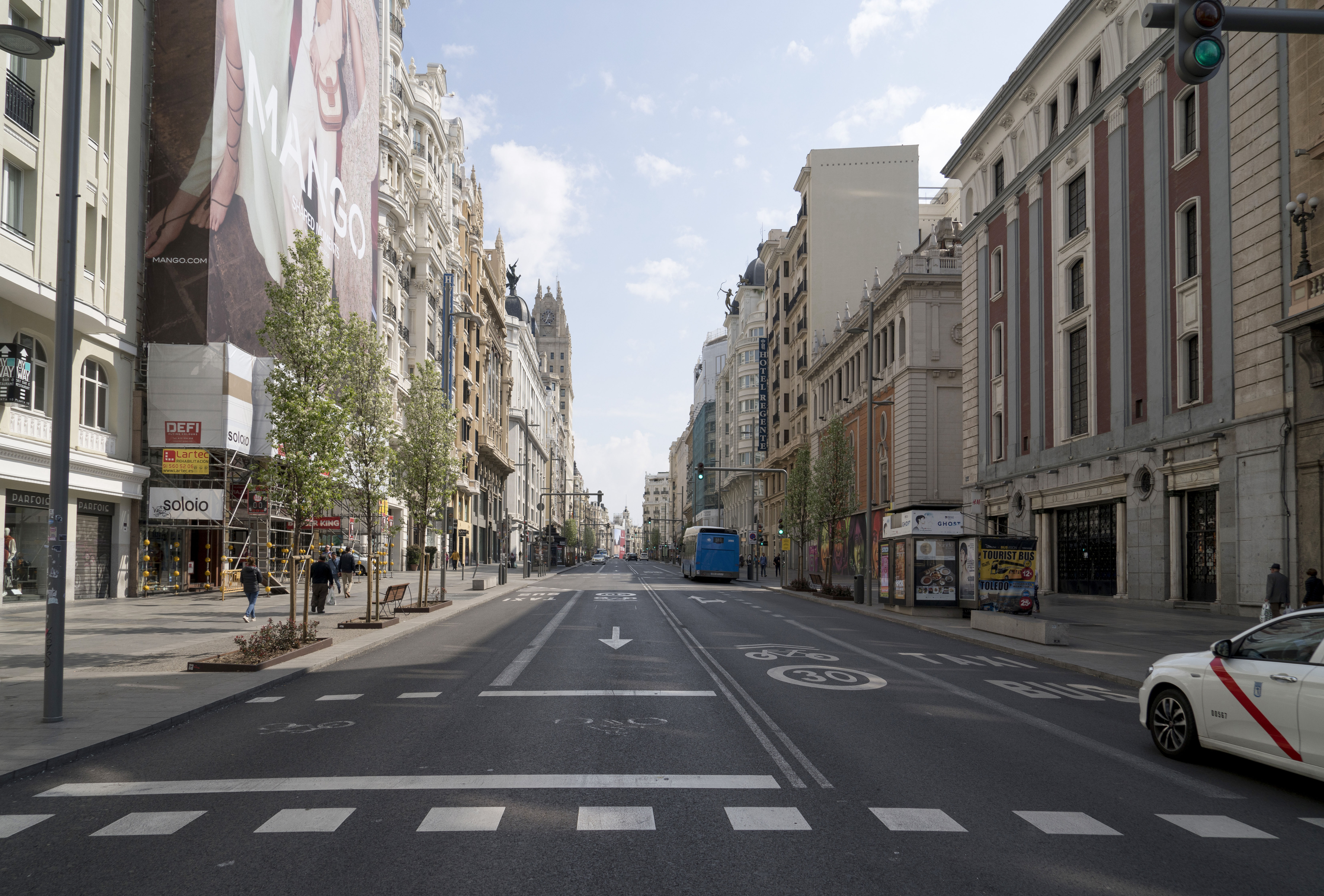 Gran Vía, Madrid. 15 de marzo de 2020, durante la cuarentena motivada por la pandemia del coronavirus.